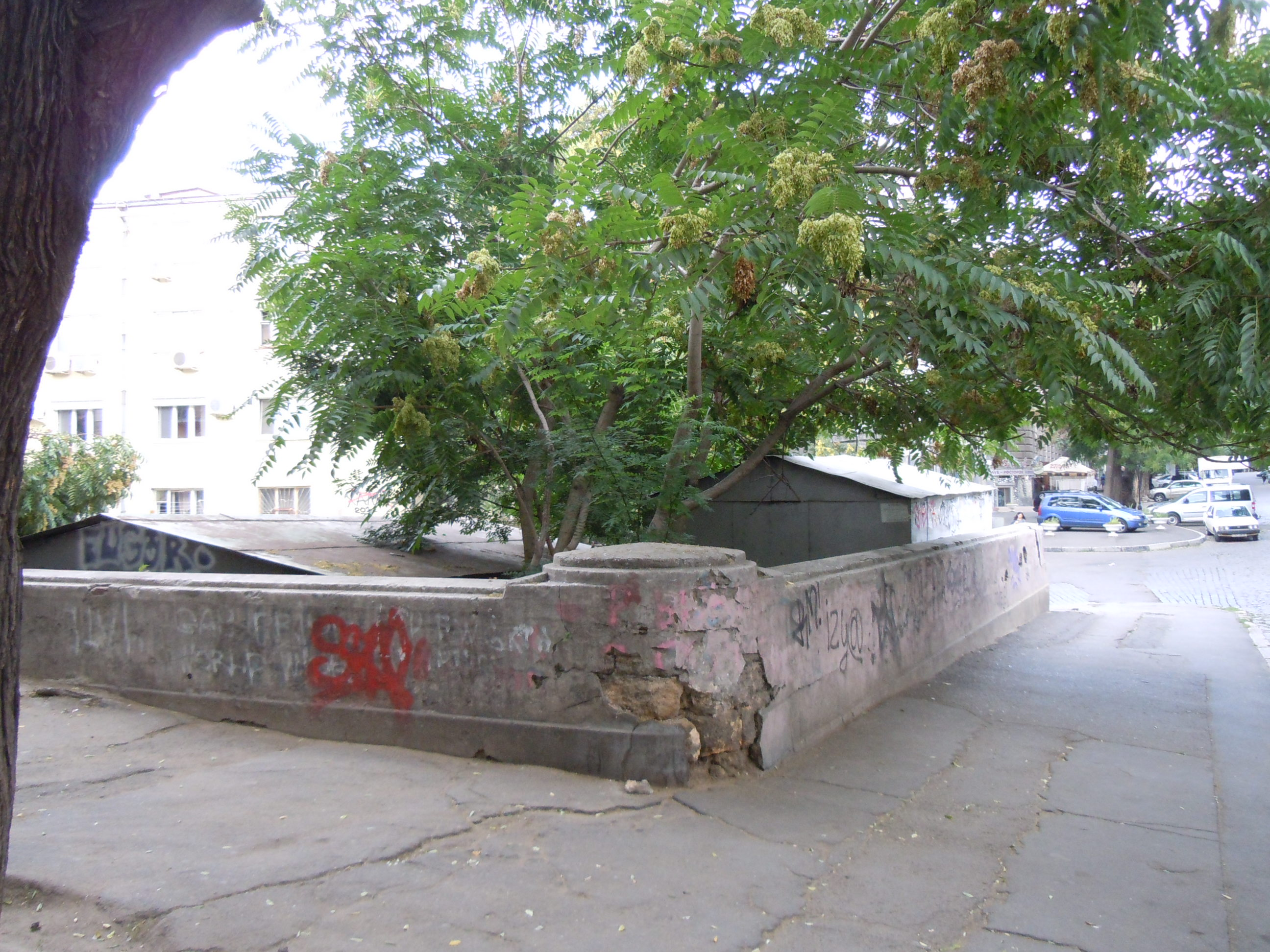 Залишки мосту Сікарда на вул. Єврейській, Одеса. Міст названий в честь Шарля (Карла Яковлевича) Сікара (Charles Sicard)